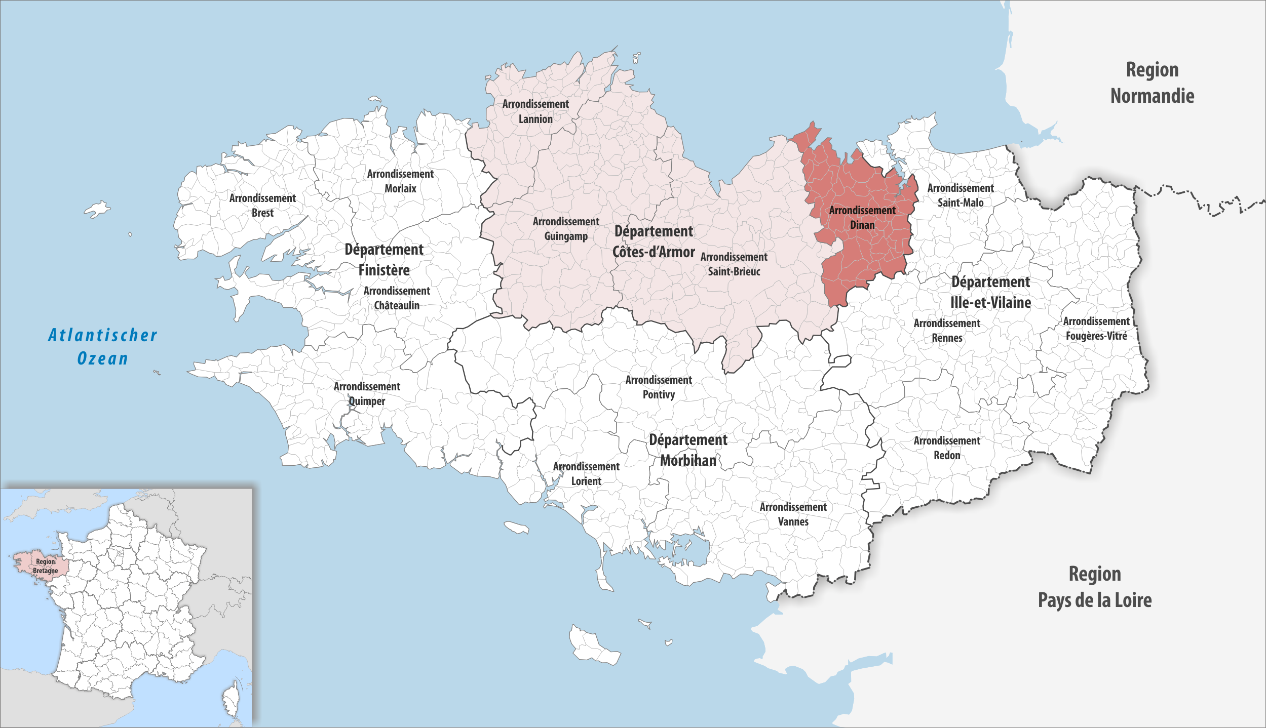 Lage des Arrondissements Dinan